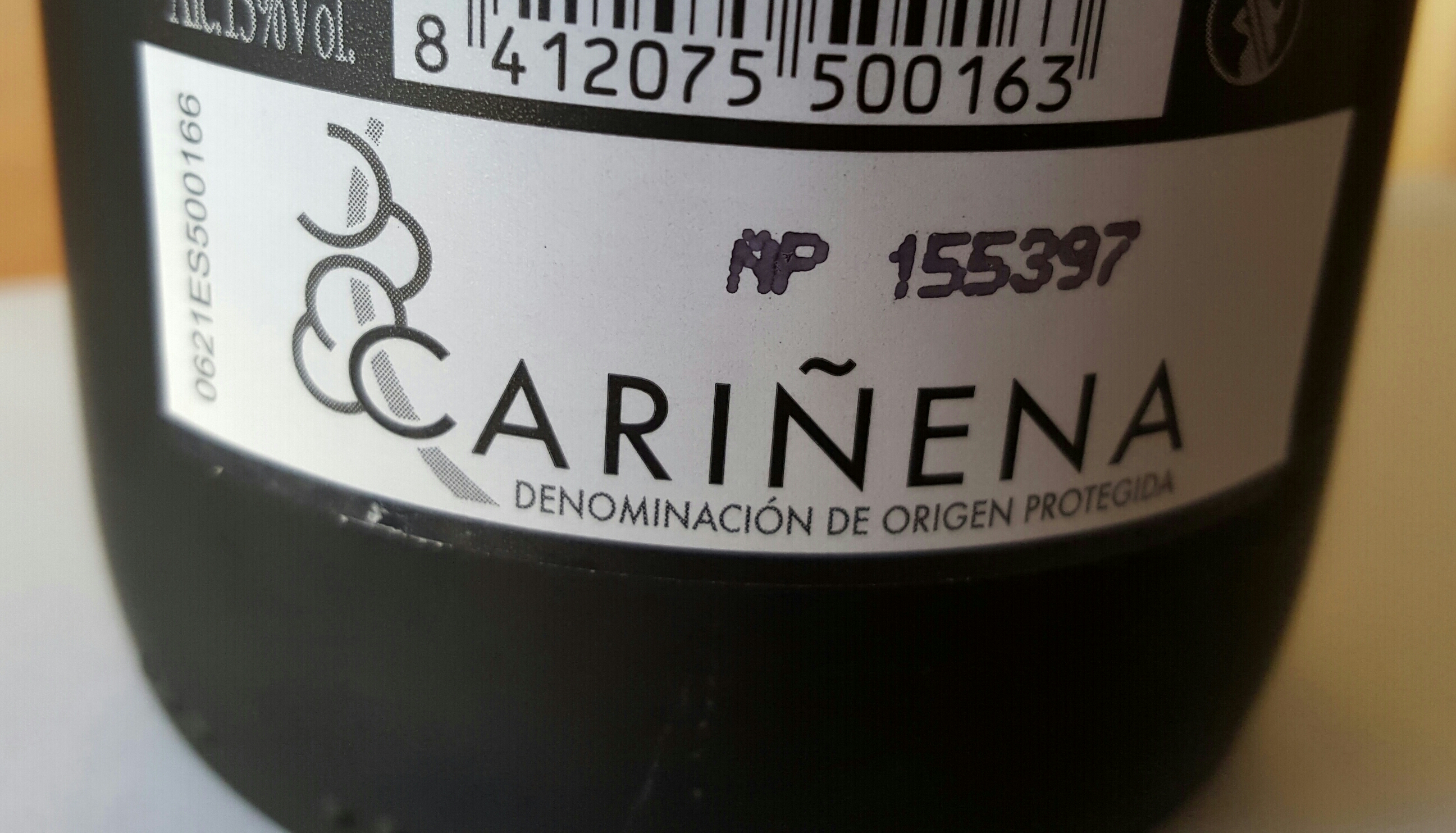 Etiqueta de la DO Cariñena, España